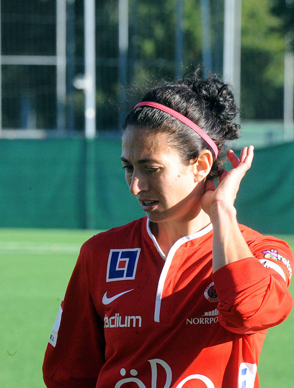 a_58_4458